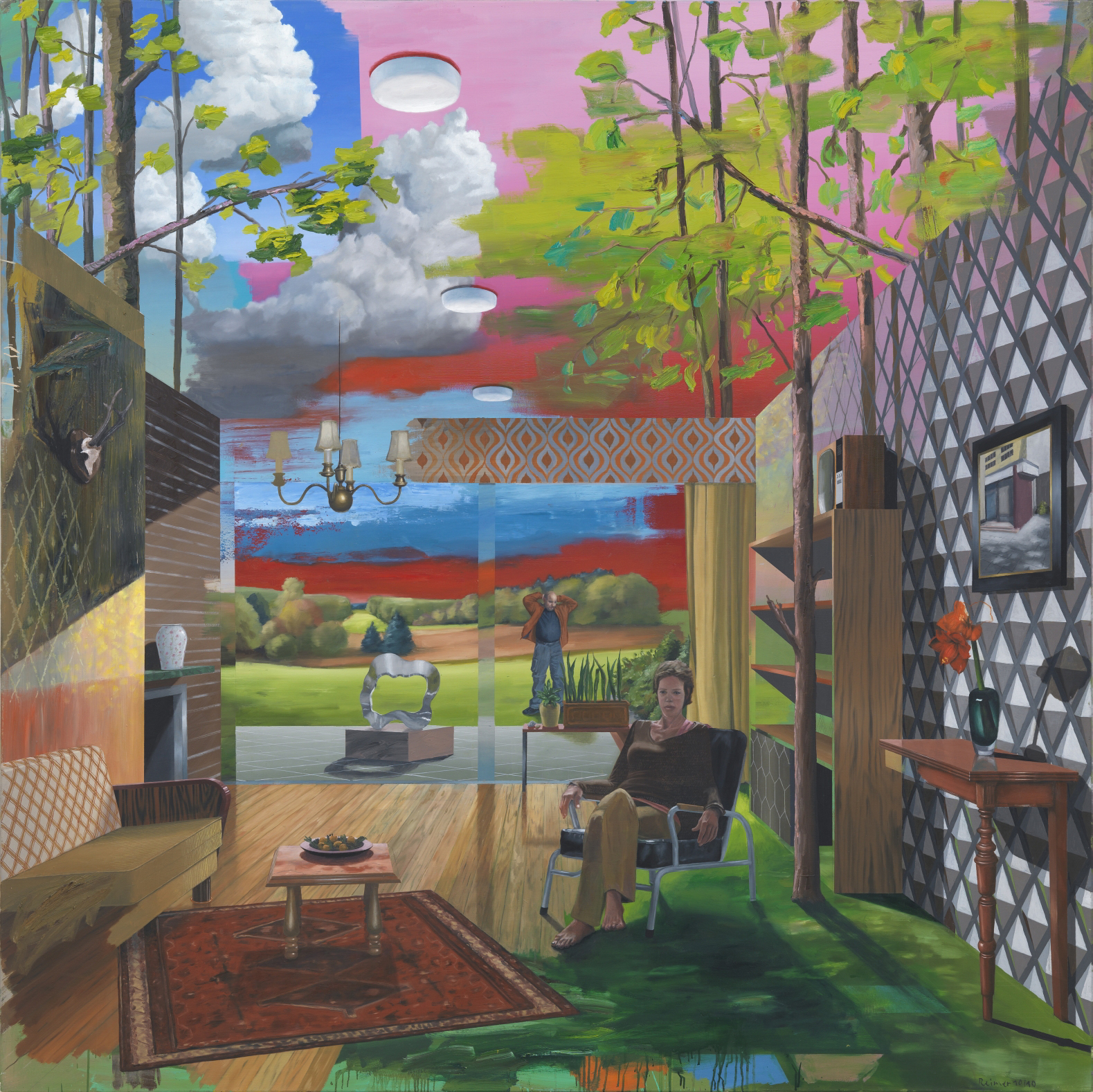 Ölbild von Hermann Reimer